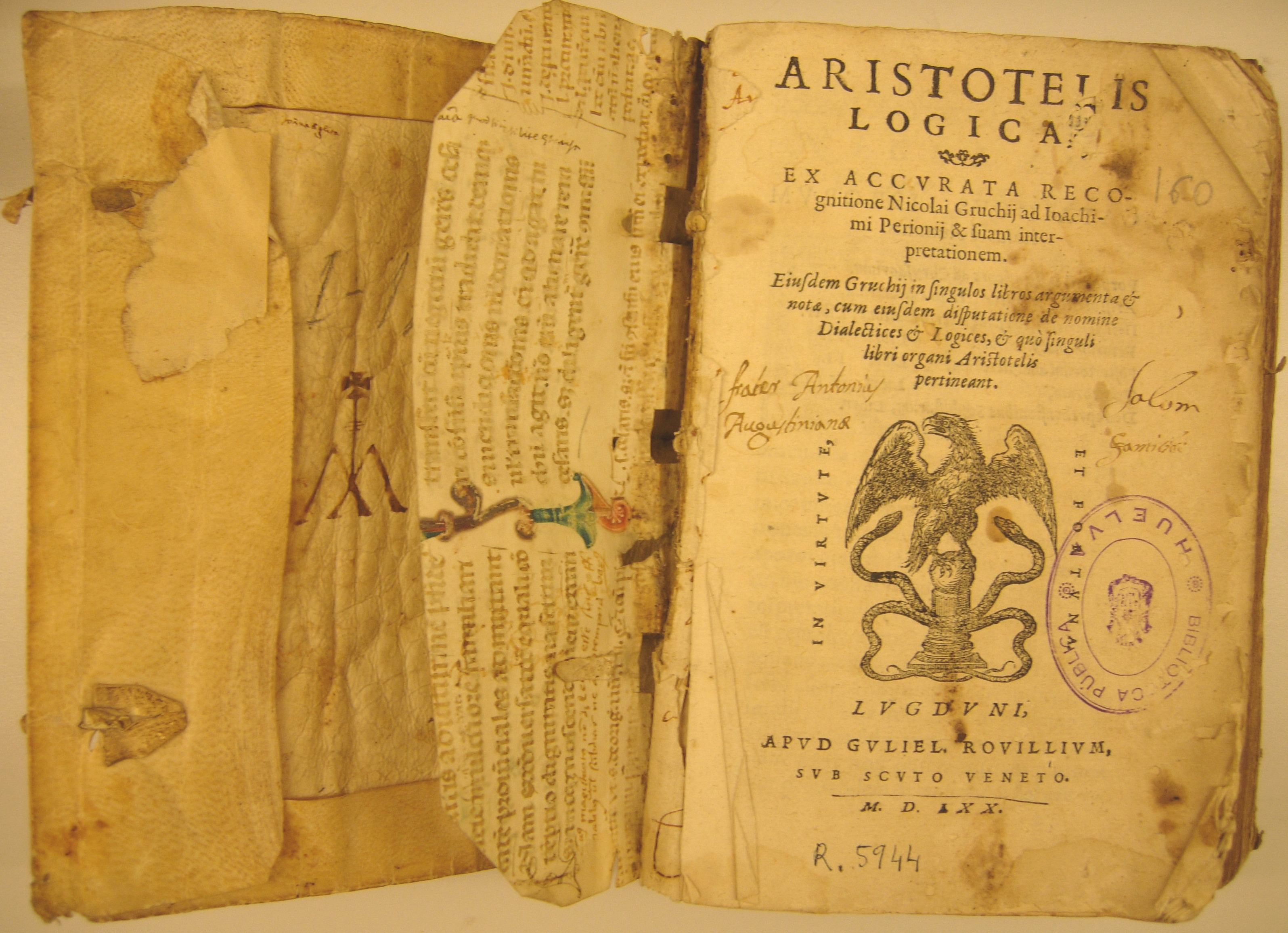 El libro más antiguo que se conserva en la Biblioteca Pública del Estado - Biblioteca Provincial de Huelva. Una edición de la Lógica de Arístoteles impresa en Lyon en 1570